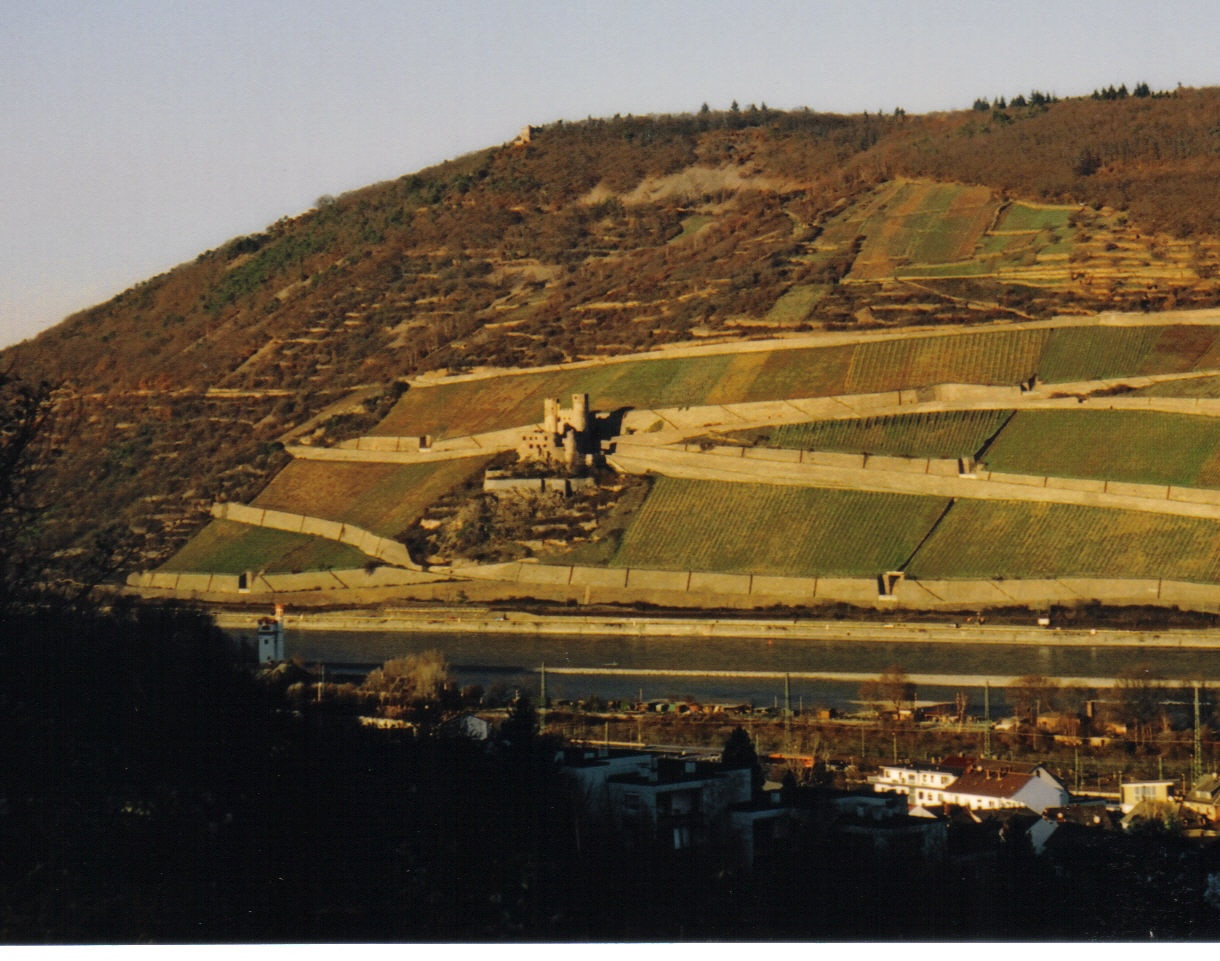 Weinbauterrassen um Ehrenfels 2004